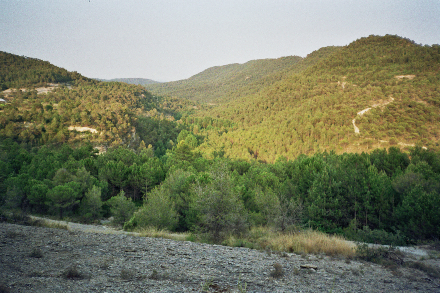 La vall de la Golards, a la Coma (Monistrol de Calders, Moianès)